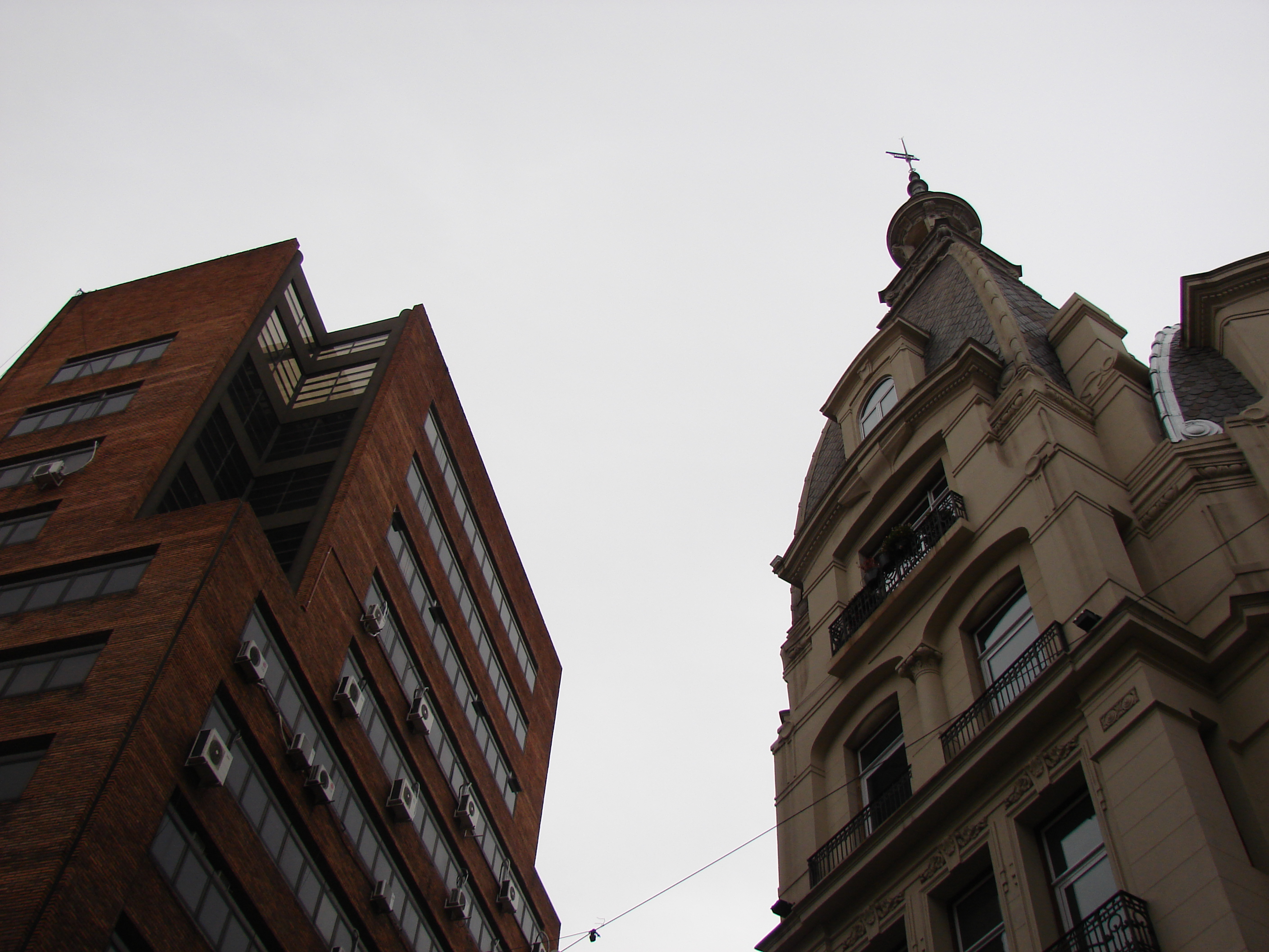 Posmodernidad frente al Academicismo francés